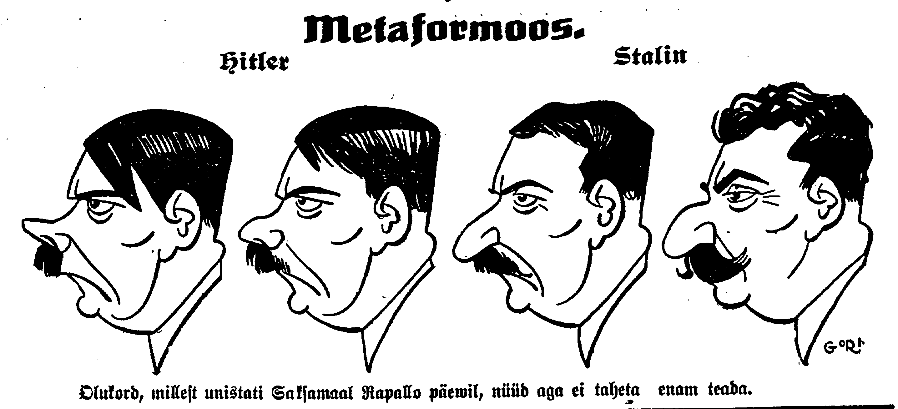 Metamorfoos. Olukord, millest unistati Saksamaal Rapallo päevil, nüüd aga ei taheta enam teada.